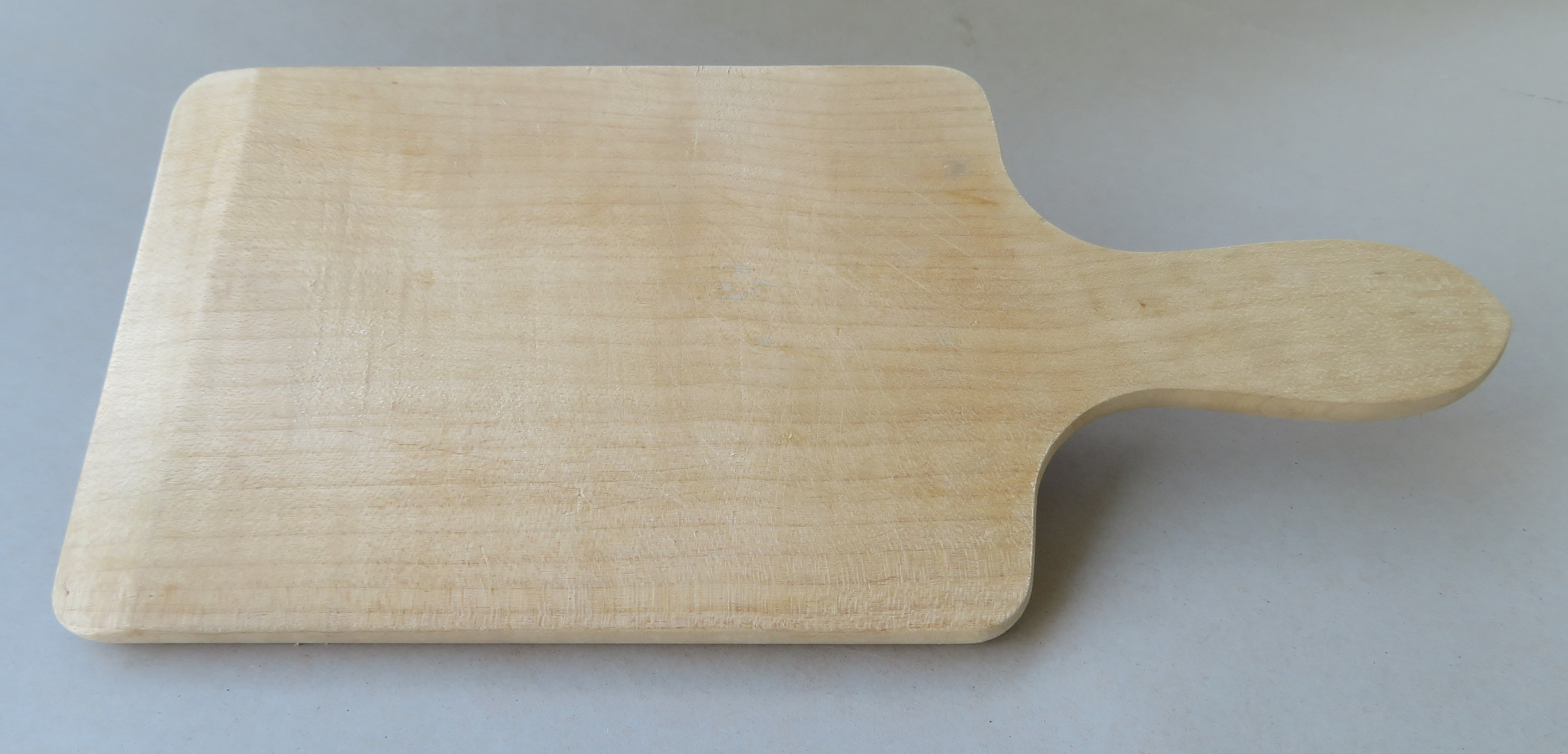 Spätzlesbrett mit Gebrauchsspuren